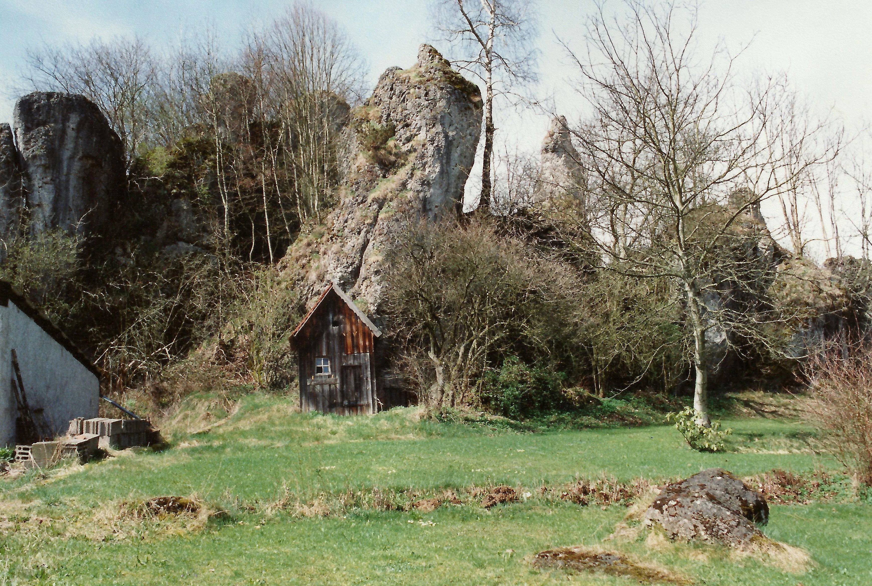 Burgstall Bieberbach (1998)